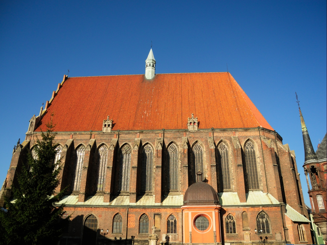 Dach Bazyliki w Nysie podczas remontu. Na dachu dachówka coppo winter w kolorze nordico Industrie Cotto Possagno